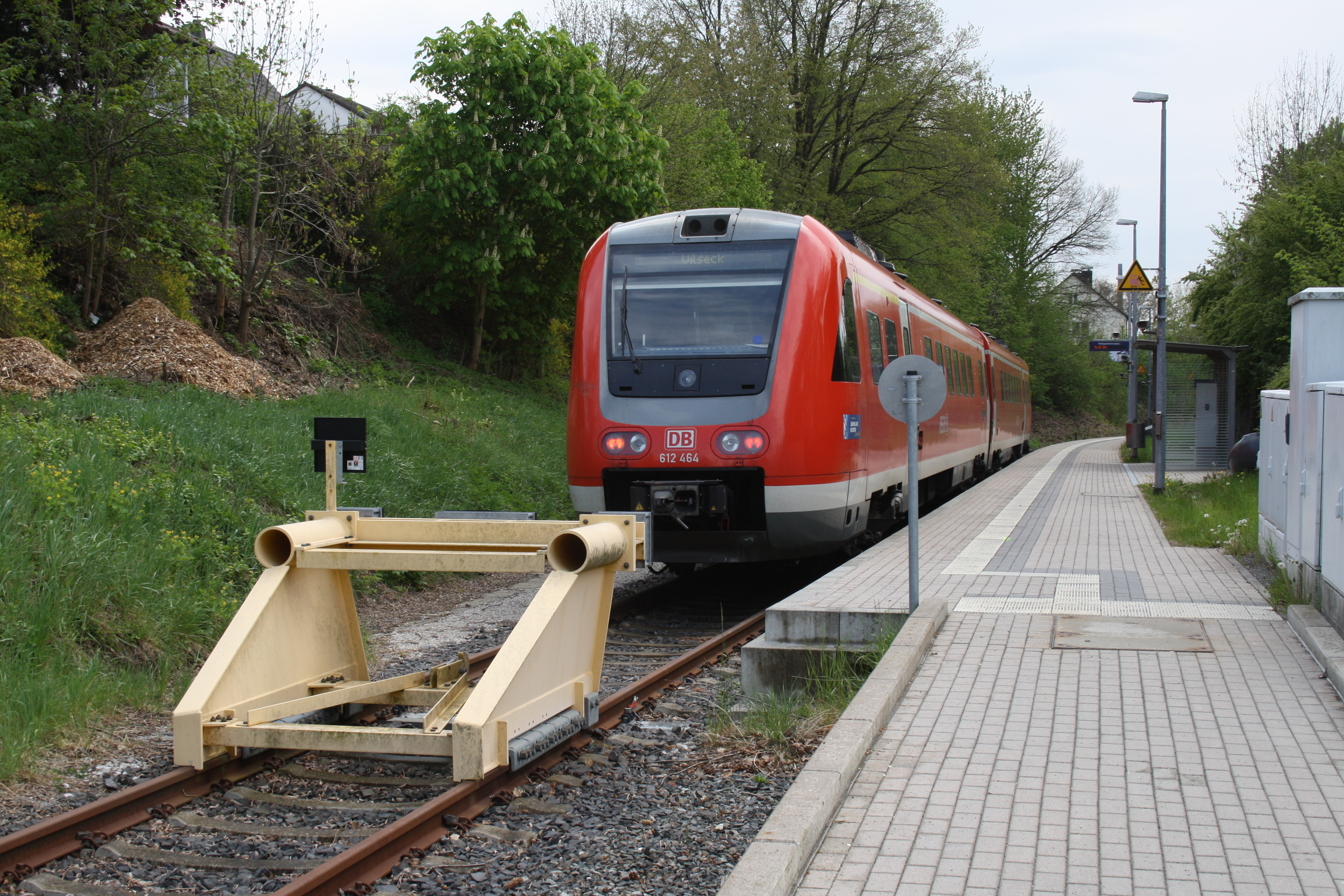 Haltpunkt Neustadt (Waldnaab)